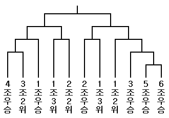 18기까지의 용왕전 결승토너먼트표